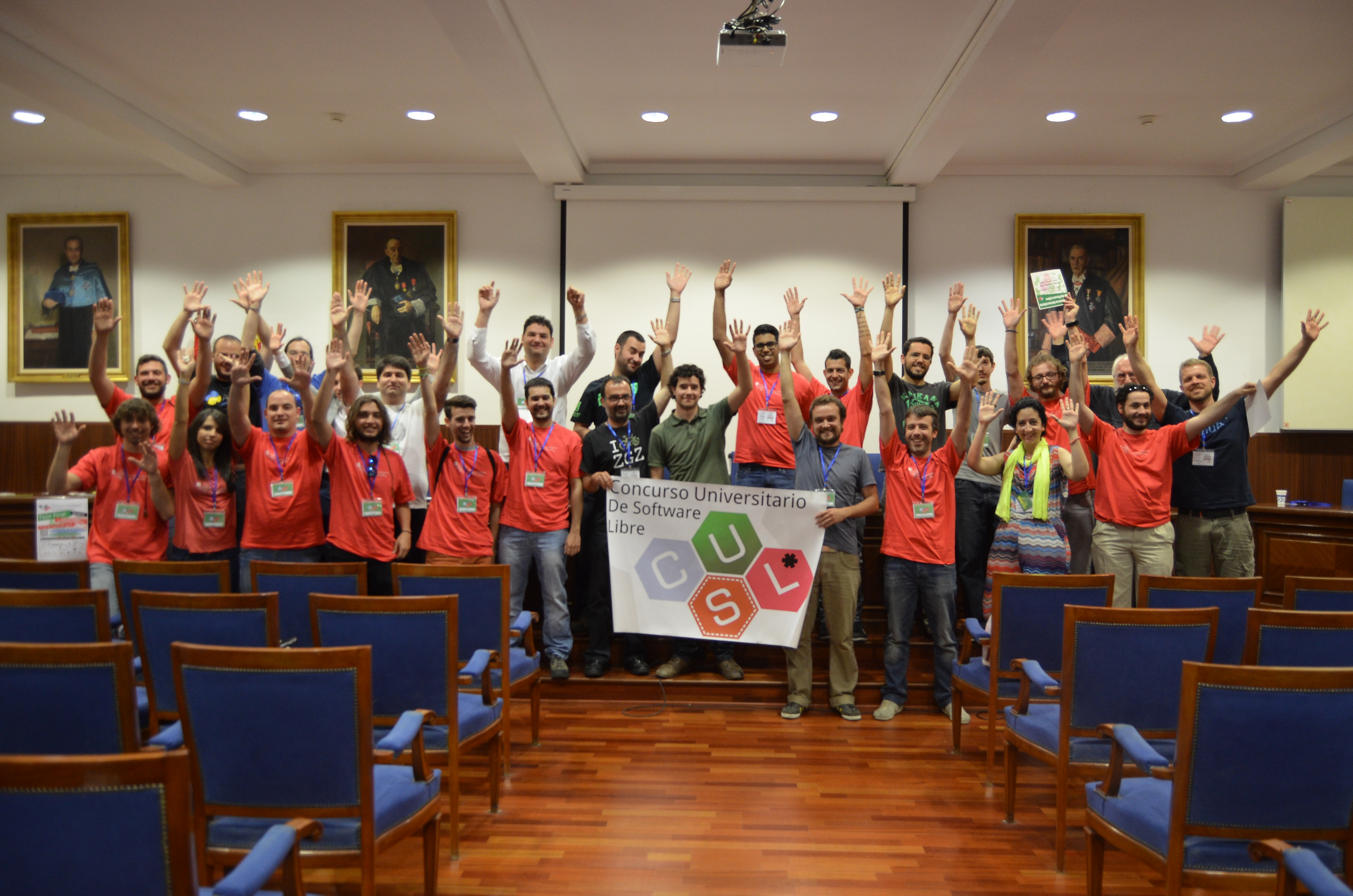 La Fase Final del IX Concurso Universitario de Software tuvo lugar los días 7 y 8 de mayo de 2015, en la Sala de Grados de la Facultad de Ciencias de la Universidad de Zaragoza.